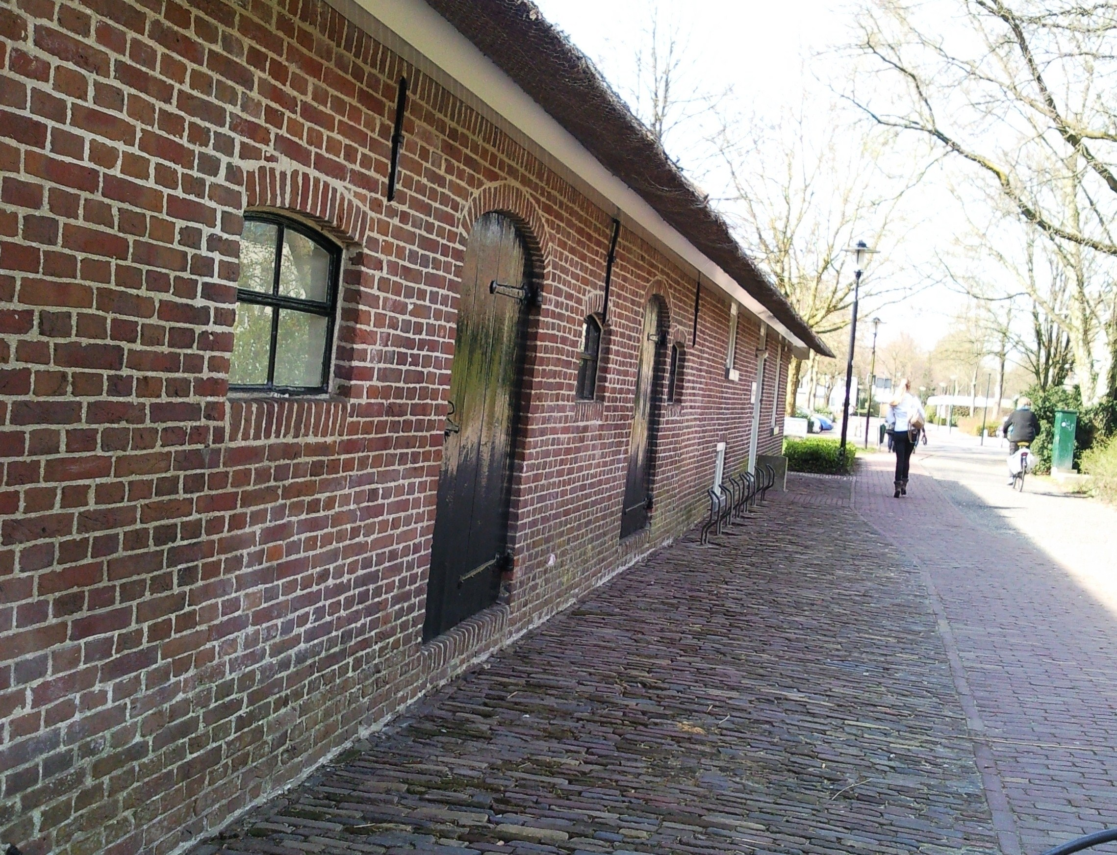 Oude stadsboerderij in het centrum van Leusden. Filmhuis Leusden is er op het moment gedeeltelijk in gevestigd.